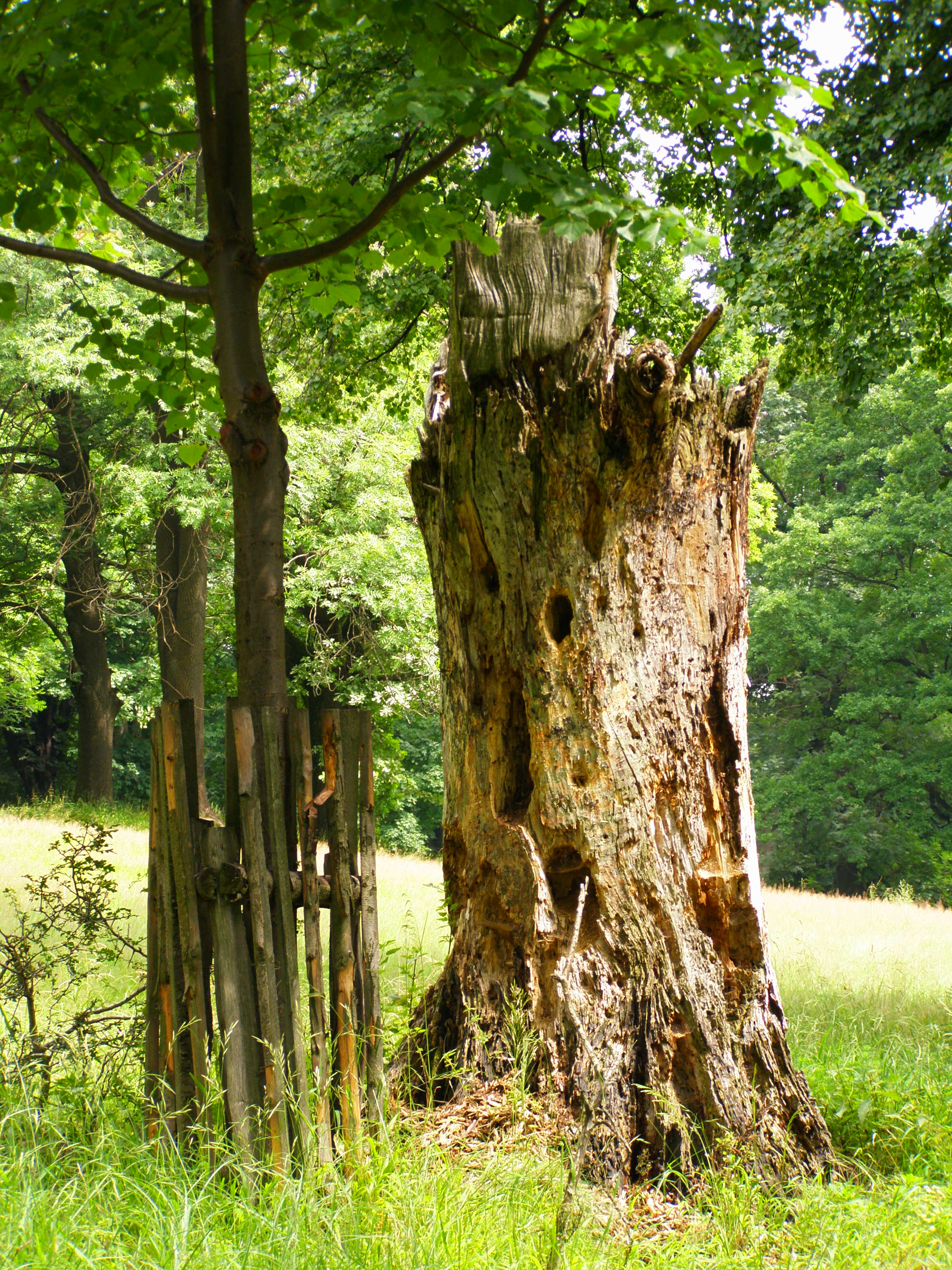 Palkovické hůrky, Přírodní památka Hradní vrch Hukvaldy, pahýl stromu